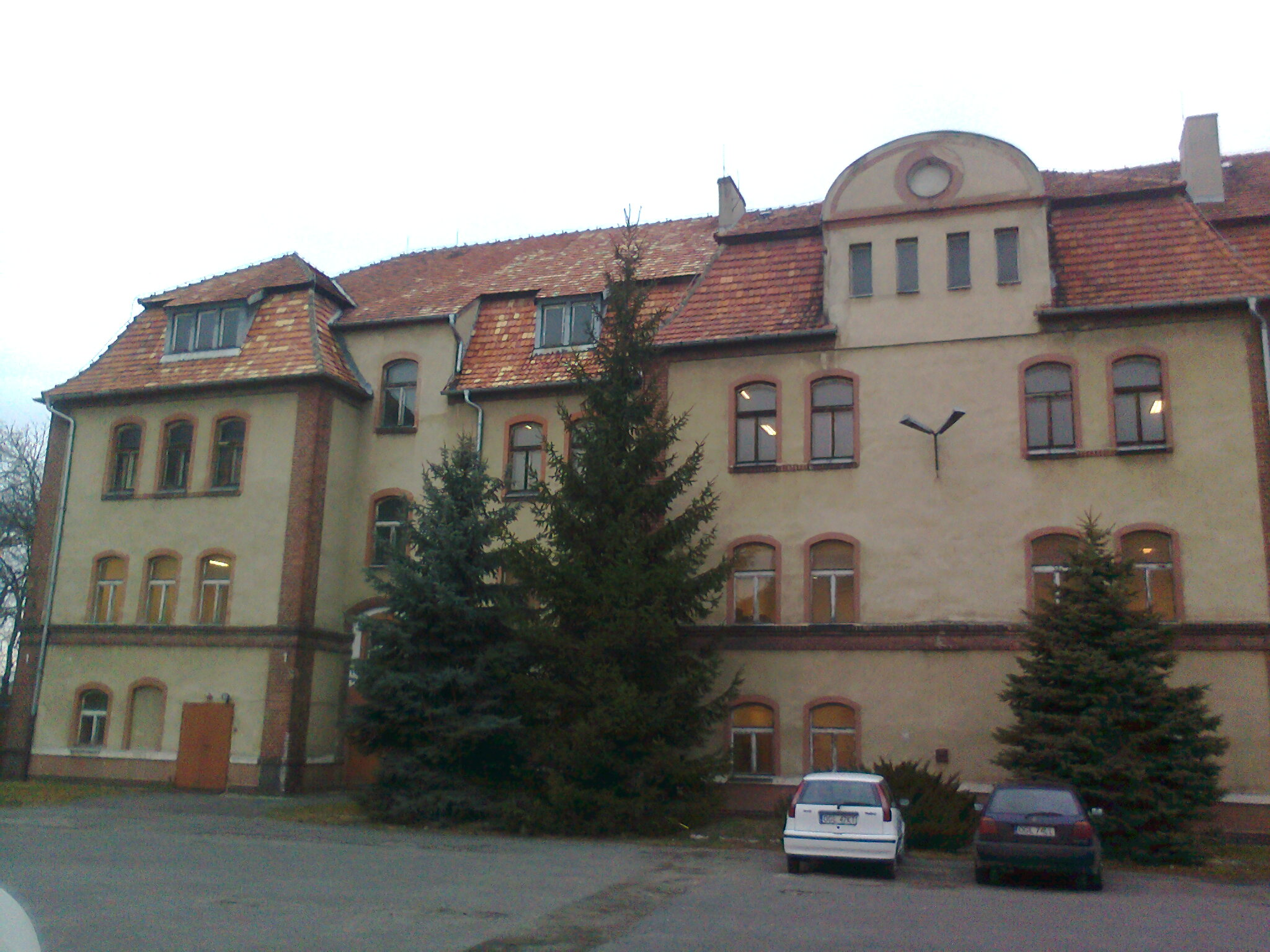 Głubczyce, byłe koszary w Głubczycach — widok od strony dawnego placu apelowego